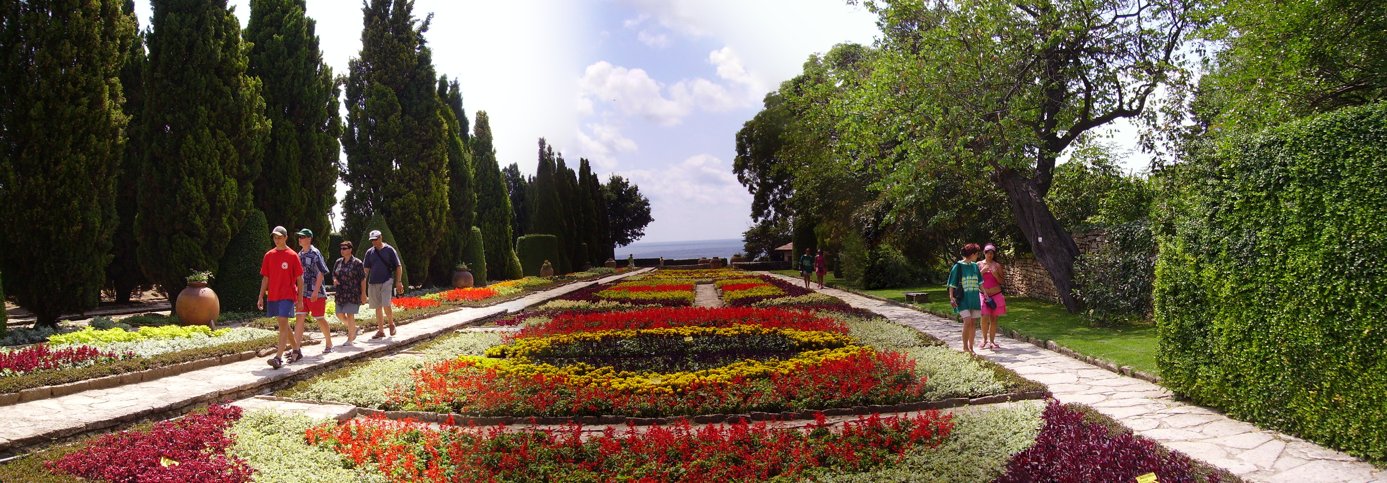 Алея с цветя от Ботаническата градина в Балчик